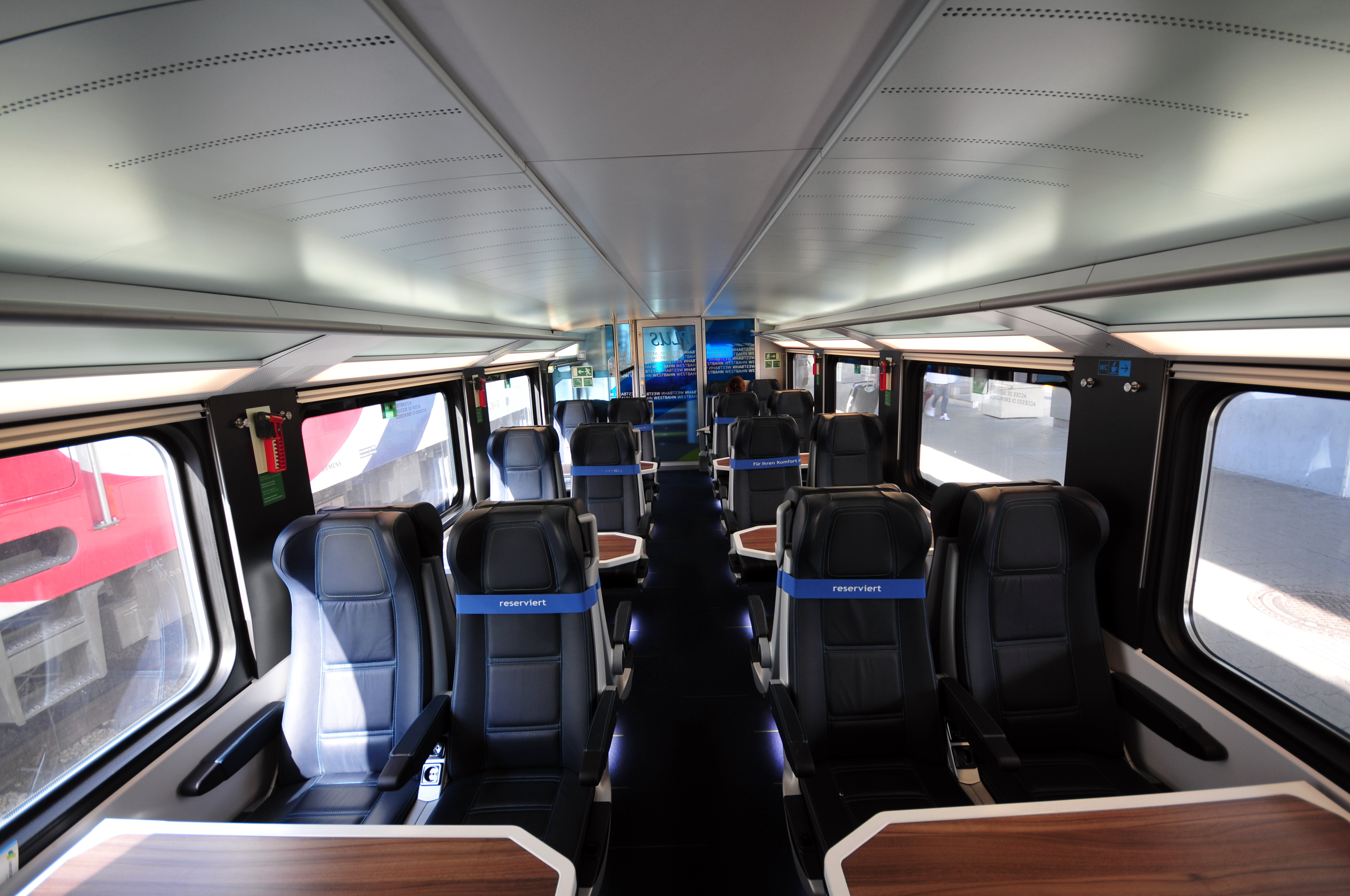 Wien